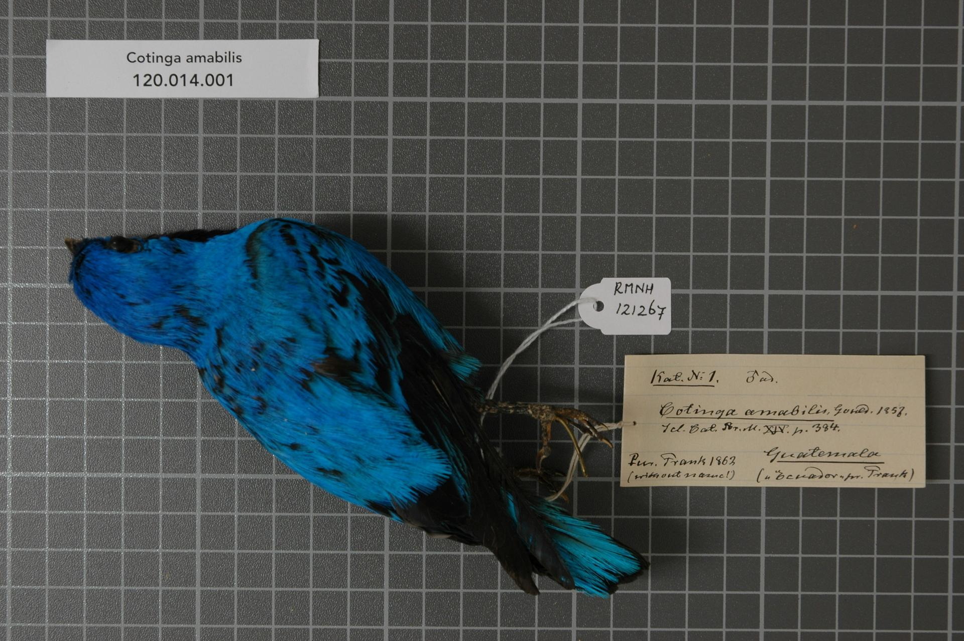 Cotinga amabilis Gould, 1857